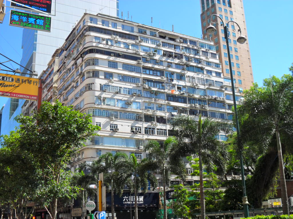 由尖沙嘴彌敦道望看海防大廈